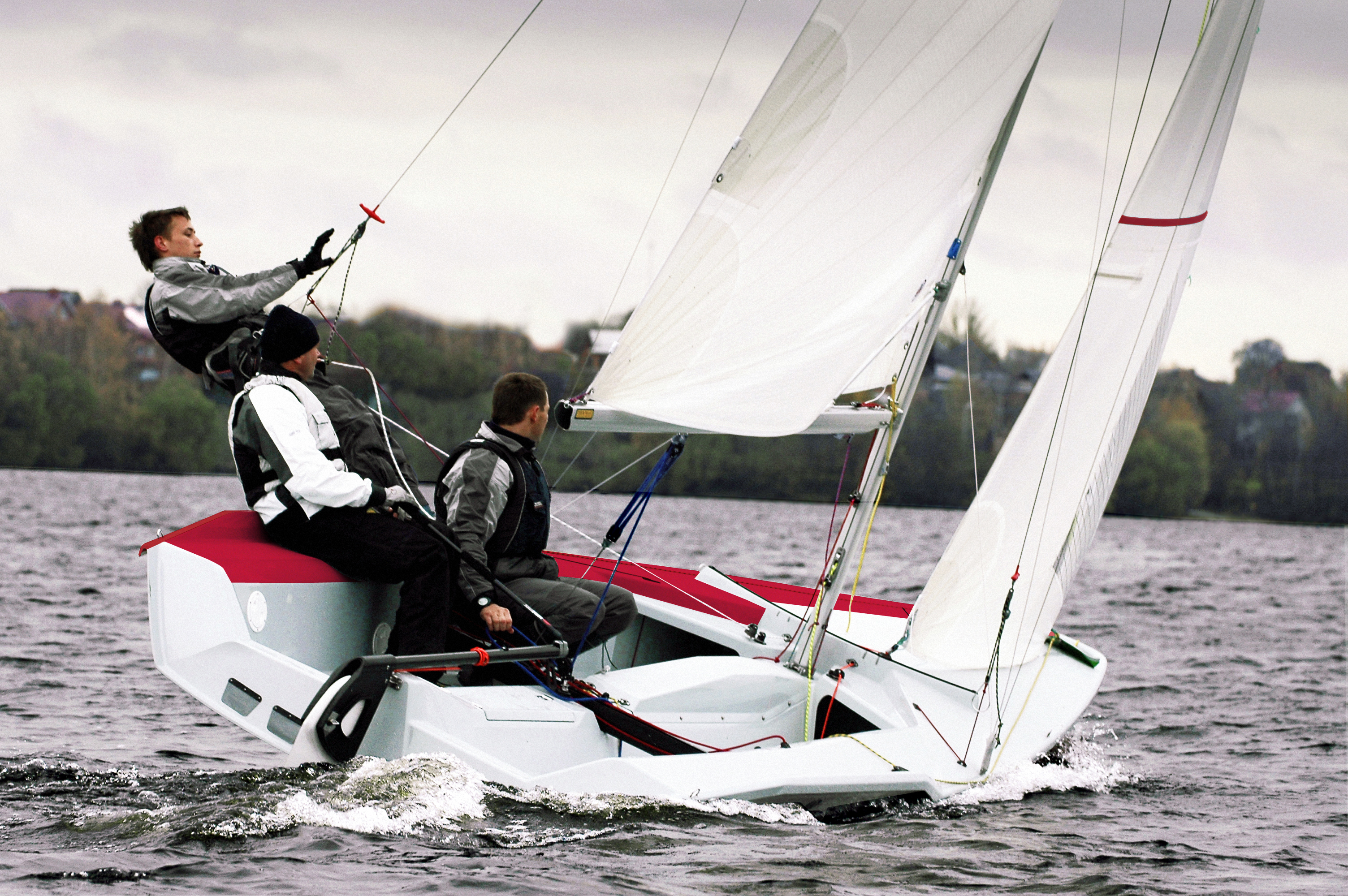 Boris Bernaskoni. Boat. Design-Project.